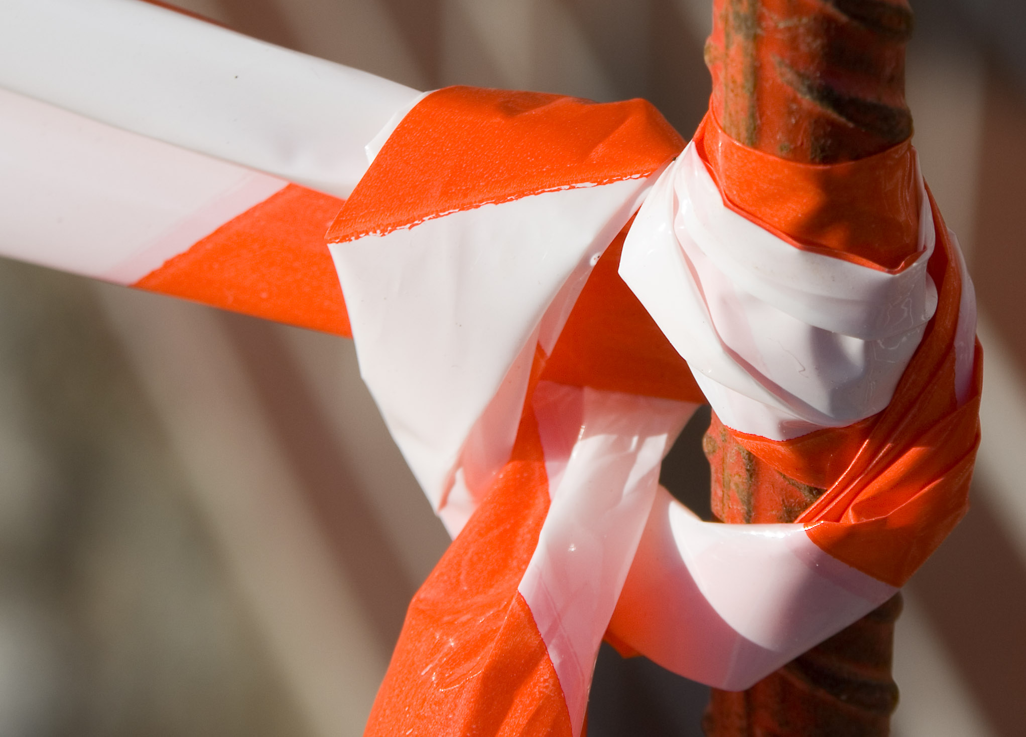 de la rubalise.